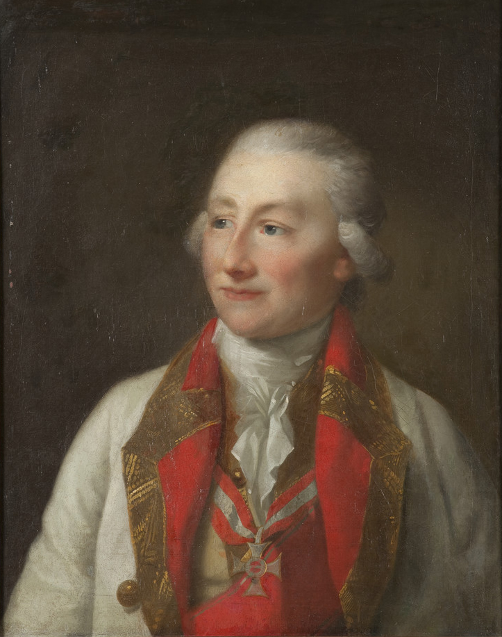 Christian August von Waldeck-Pyrmont (1744-1798), General in österreichischen Diensten, sowie zuletzt Oberbefehlshaber und Feldmarschall der portugiesischen Landarmee.